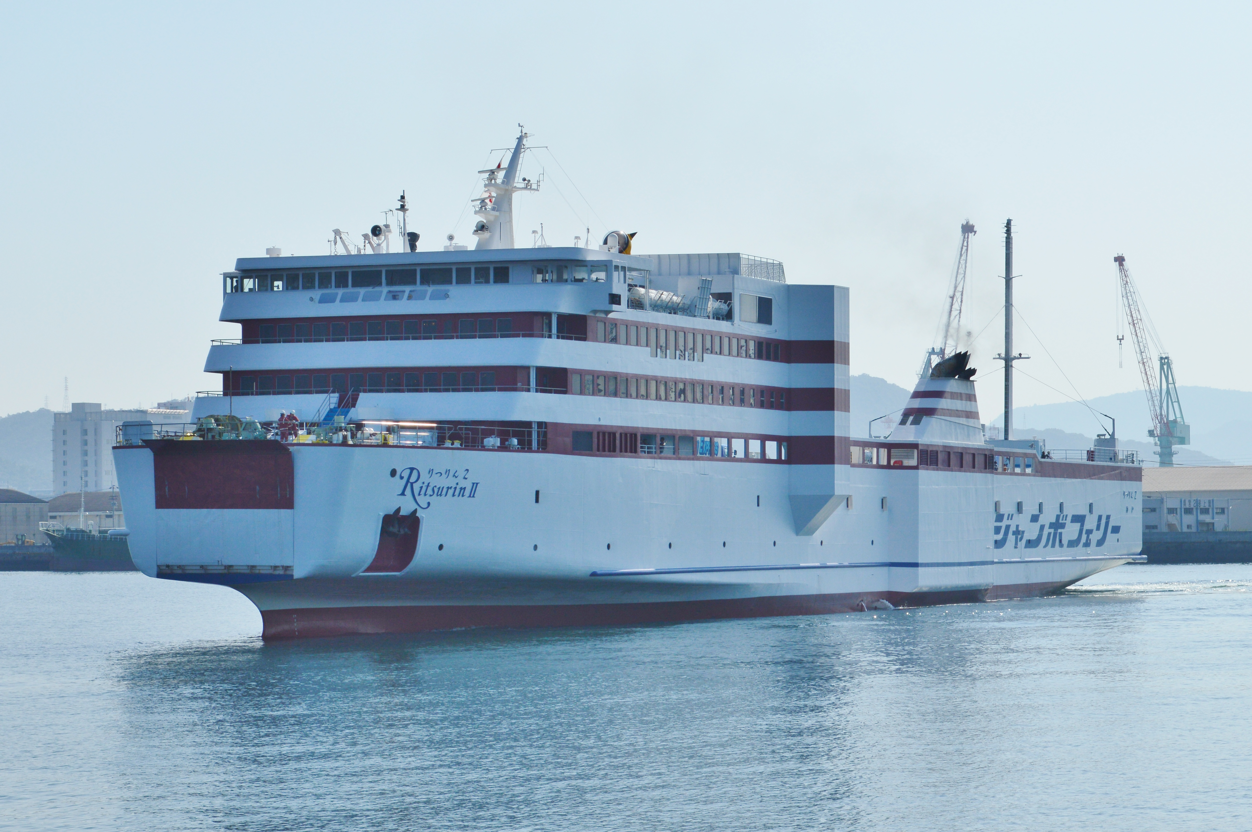 りつりん2 全景